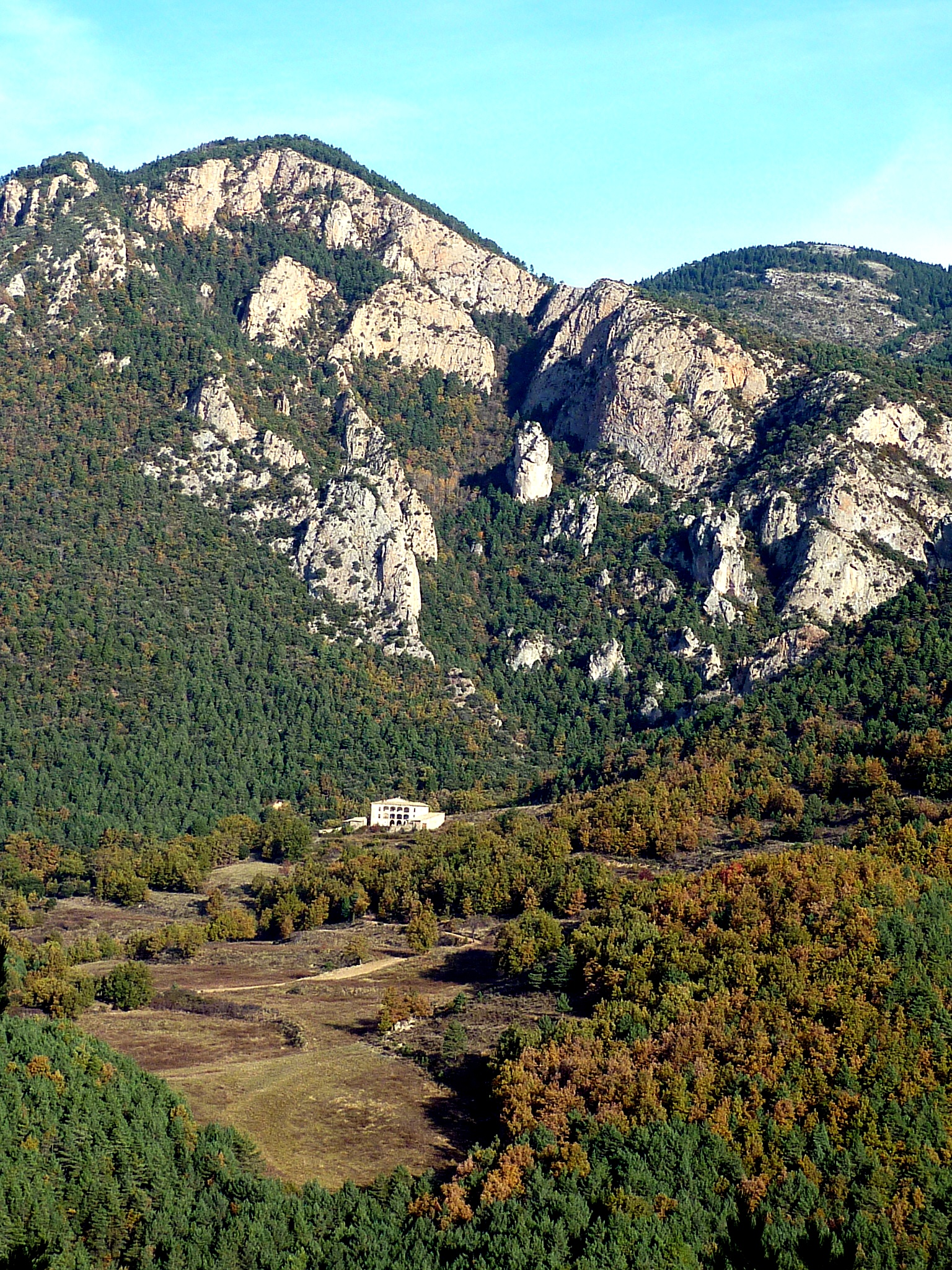 Les Costes de Rebalç per sobre de la masia del Pujol del Racó. La Coma i la Pedra (Solsonès - Catalunya)